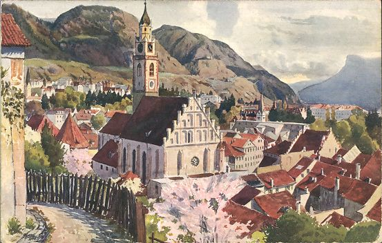 Meran vom Tapeinerweg